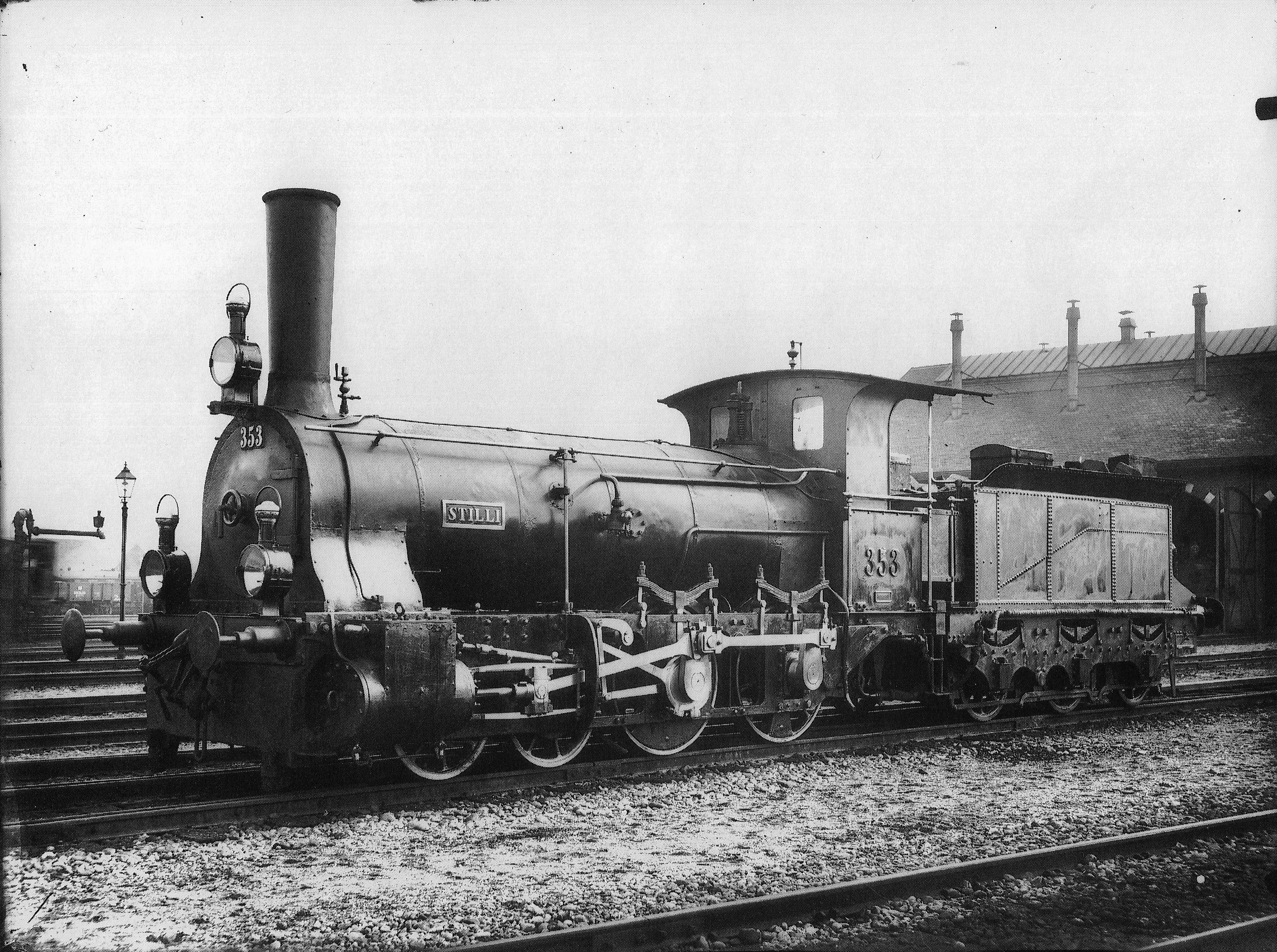 Güterzug-Locomotive Nr. 353 Stilli des Typs C2T der Schweizeriſchen Nordoſtbahn, gebaut 1857 inn der Locomotiv-Fabrique J. A. Maffei zů München (Fabr.-Nr. 285), 1874 mit neuem Keſſel ausgeſtattet, 1875 umgebaut, 1903 außer Dienſt geſtellt und anſchließend abgebrochen; aufgnommen um 1900 im Fahrzeug-Dépôt zů Zürich.